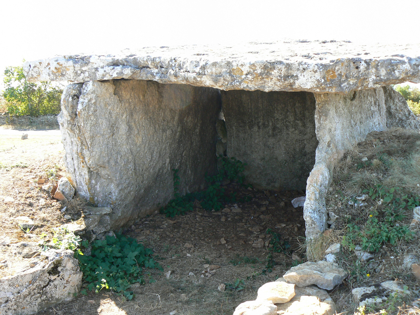 Dolmen des Sept Chemins, La Pierre Levée (Classé, 1971)